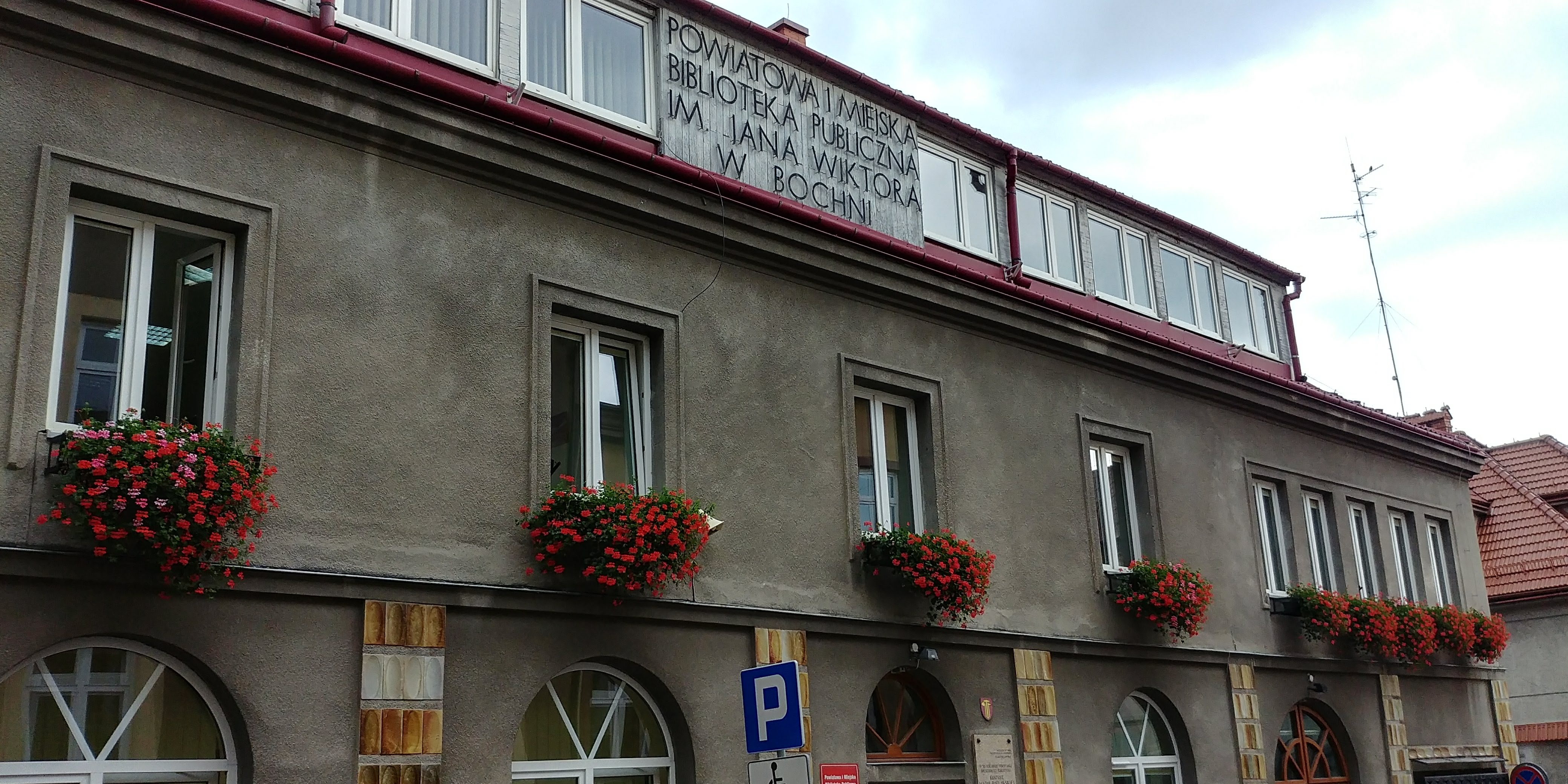 Budynek Biblioteki w Bochni.